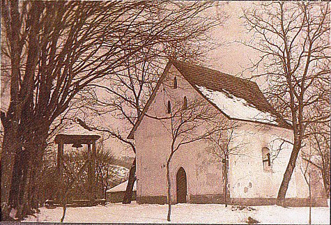 Замкова каплиця (реформаторська церква) - Довге